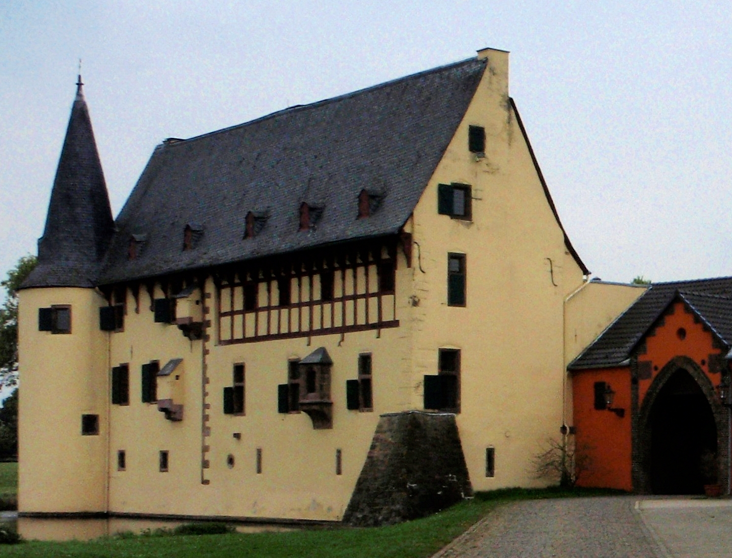 Burg Langendorf